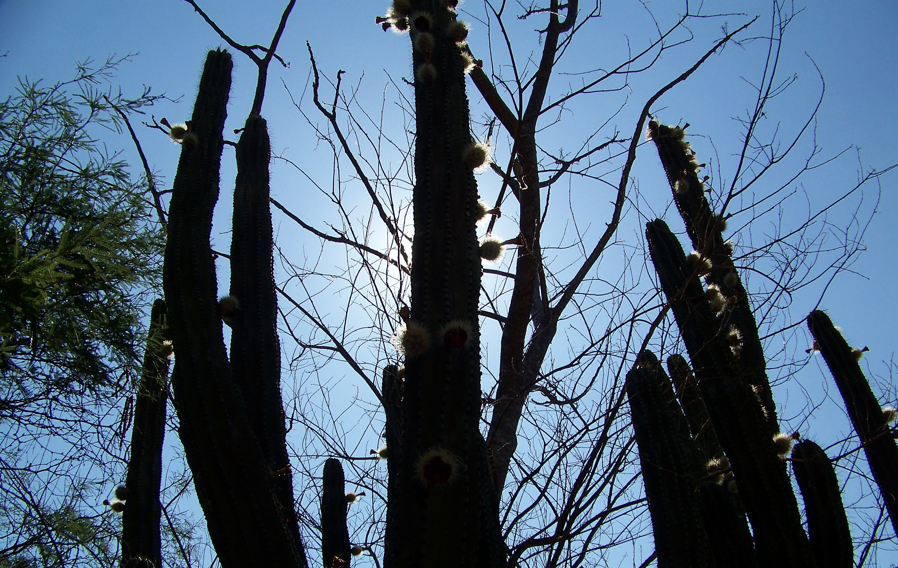 Pitayo con sus pitayas en maduraciòn, la flor ya casi esta seca y la fruta lista para comer.